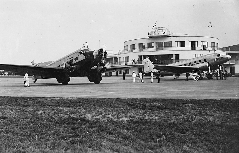 Wibault 283-T és Douglas DC-2 típusú utasszállító repülőgép. Location: Hungary, Budapest XI., Budaörs Airport Tags: airplane, airport, transport, McDonnell Douglas-brand, american brand, Wibault-brand, French brand, Budapest Title: Wibault 283-T és Douglas DC-2 típusú utasszállító repülőgép.